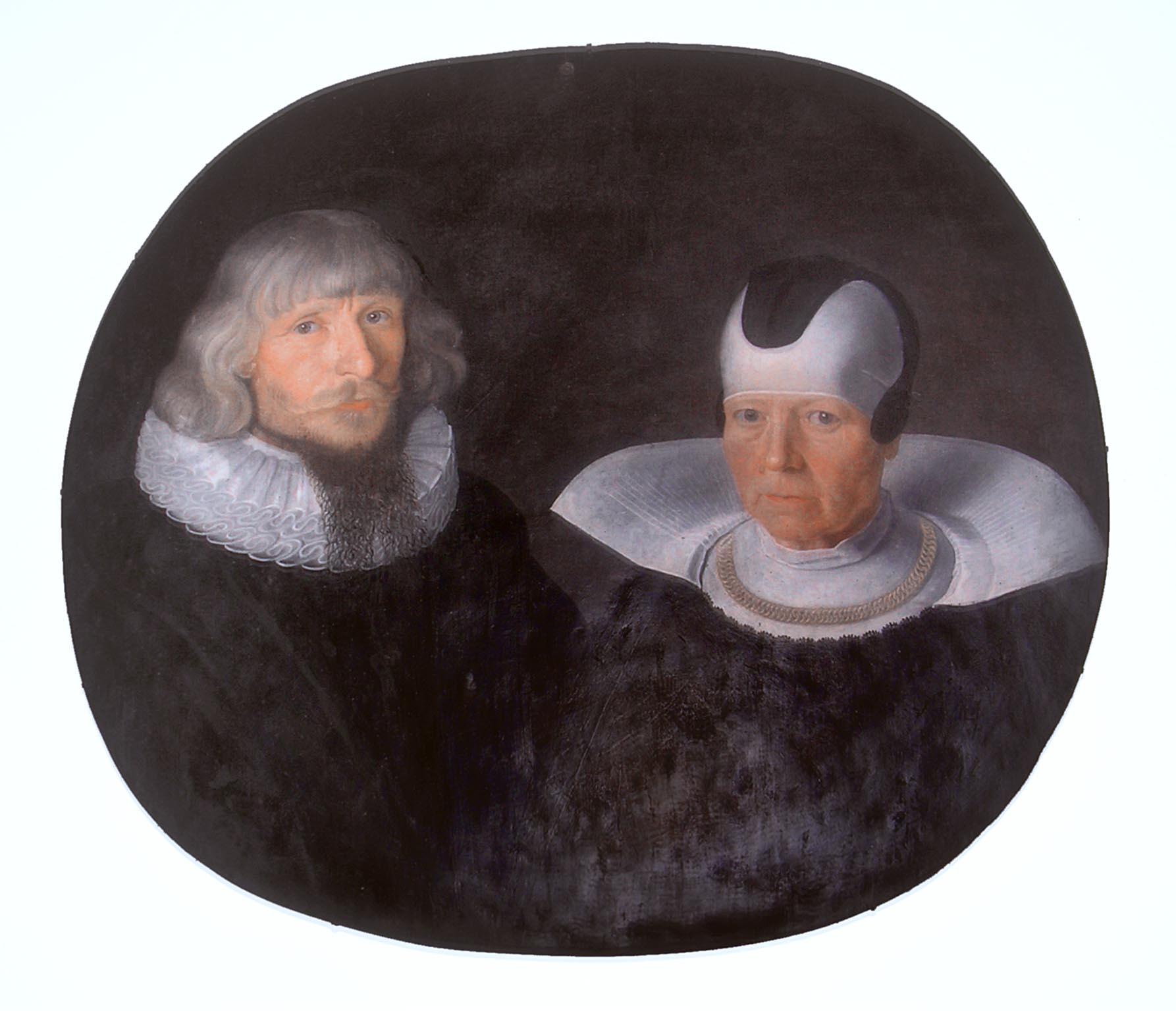 Part of a epitaf in Västra Vrams kyrka